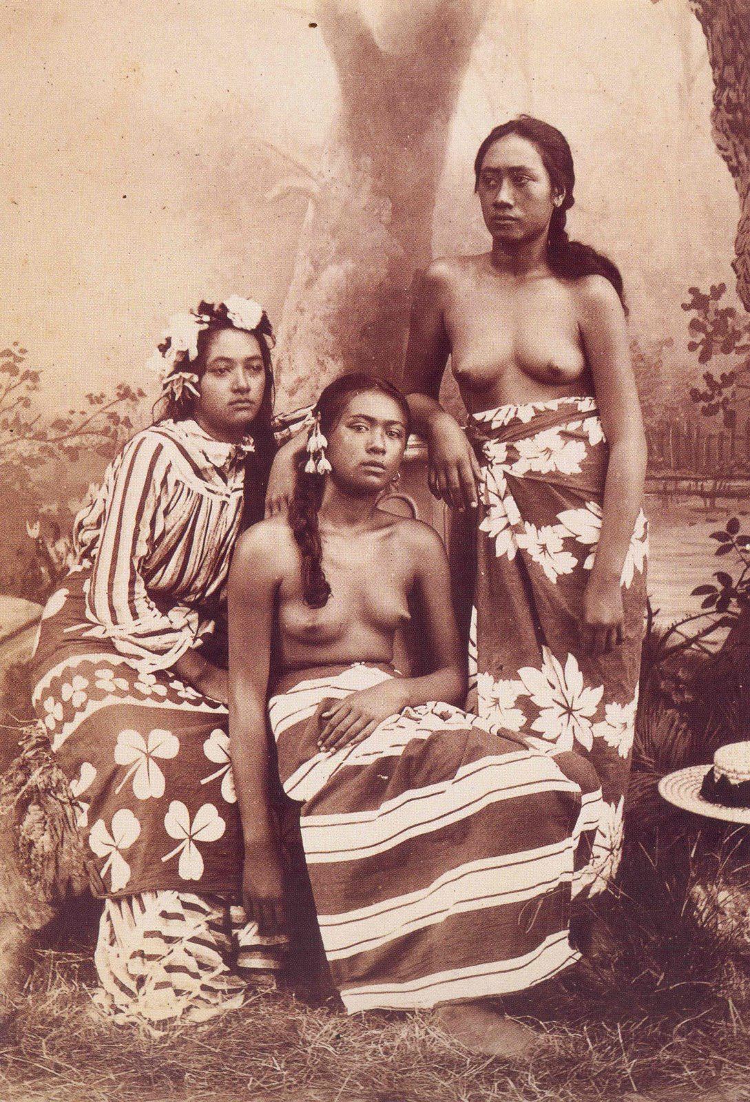 Nus tahitiens, vers 1889, Charles Georges Spitz (1857-1894).